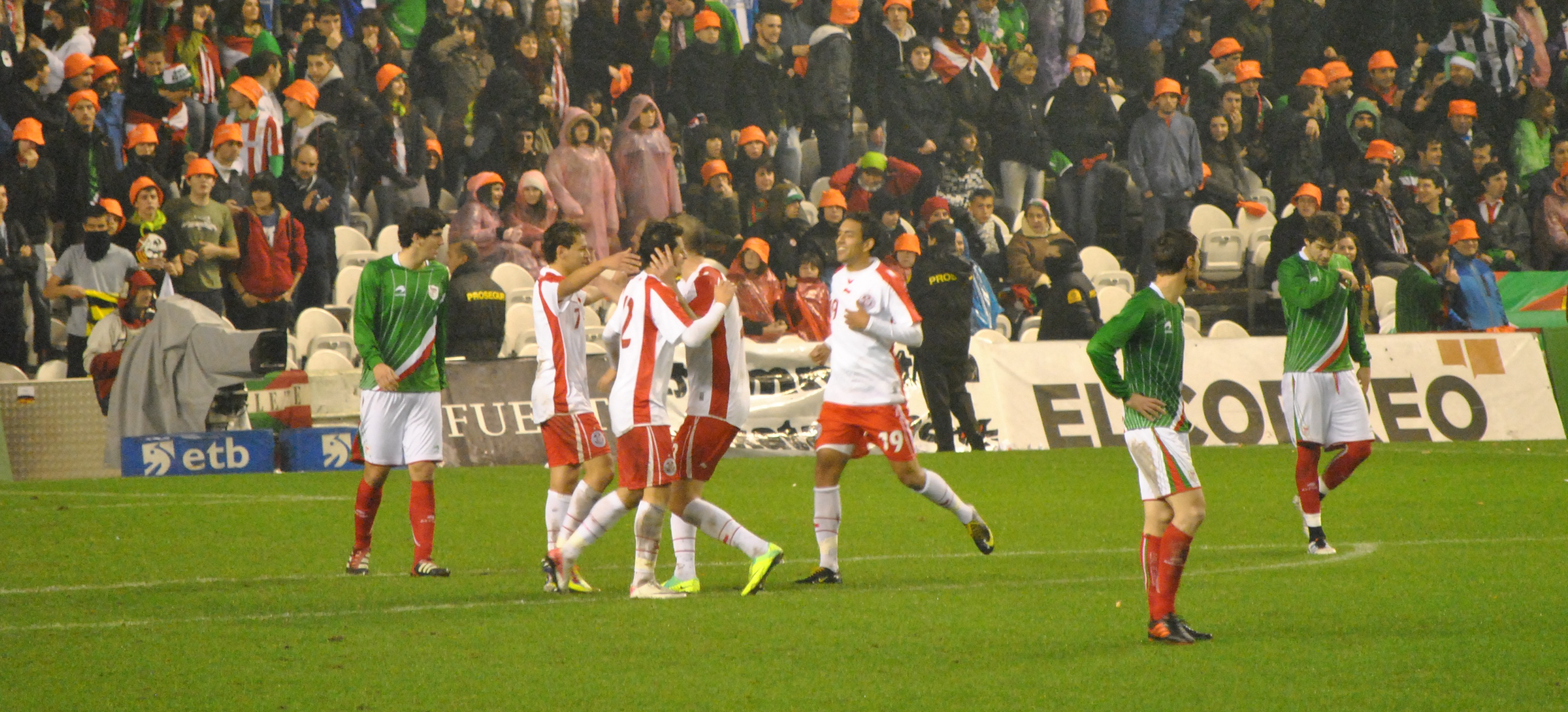 2 peros a la fiesta.- Los tunecinos no se durmieron tras el descanso. De hecho, fue entonces cuando empezaron a llegar las ocasiones más claras y dos de éstas acabaron en gol. M'Sakni Youssef (minuto 67) fue el encargado de meter el primer gol. La tricolor supo reponerse al zarpazo de los africanos y siguió luchando para cambiar el marcador. Sin embargo, Chadly.dejó prácticamente sin esperanzas a la Selección de Euskadi al marcar el segundo tanto para Túnez en el minuto 82.